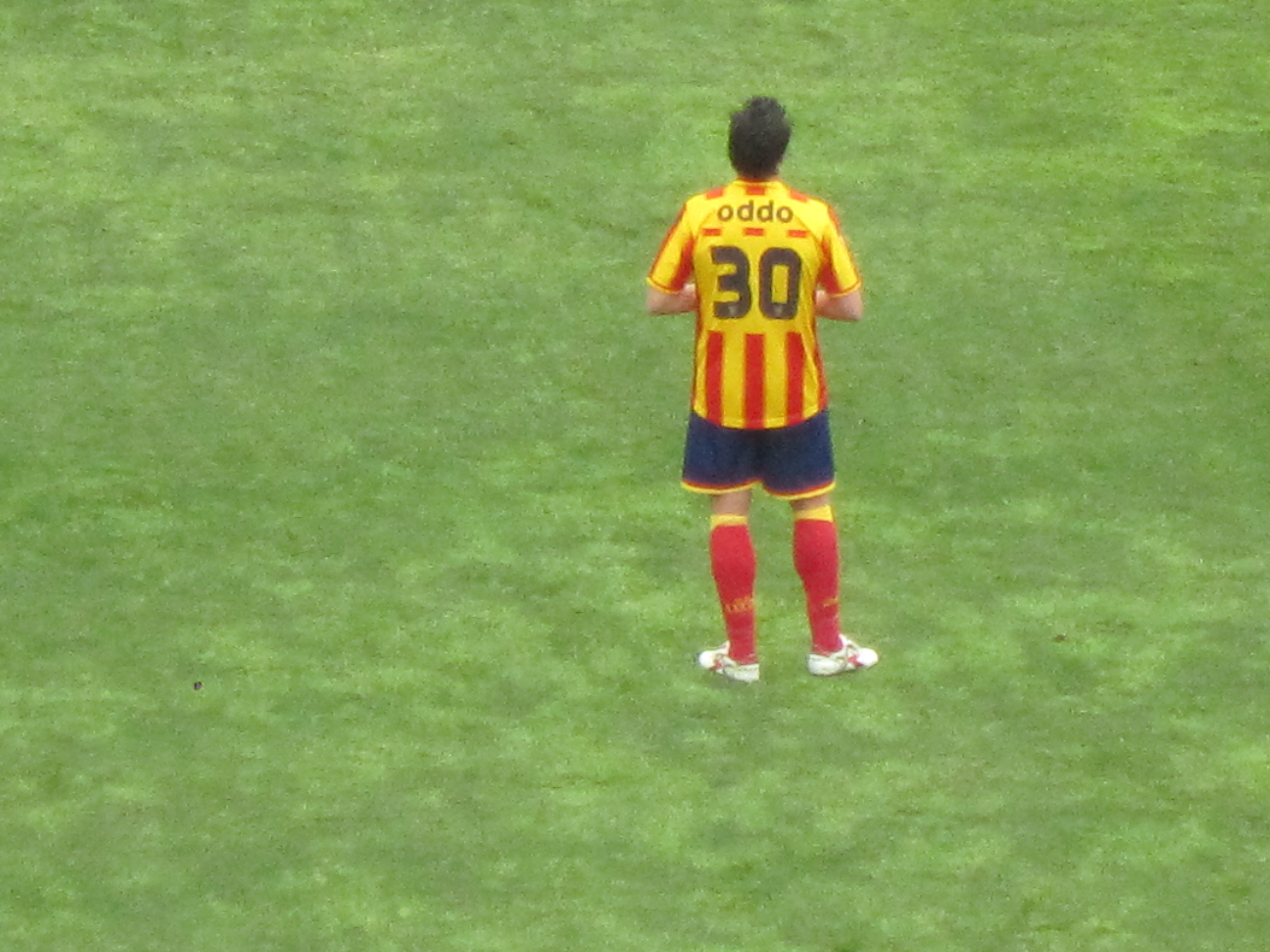 Massimo Oddo in U.S. Lecce - A.S. Roma 4 - 2, Stadio Via del Mare, April 7th, 2012